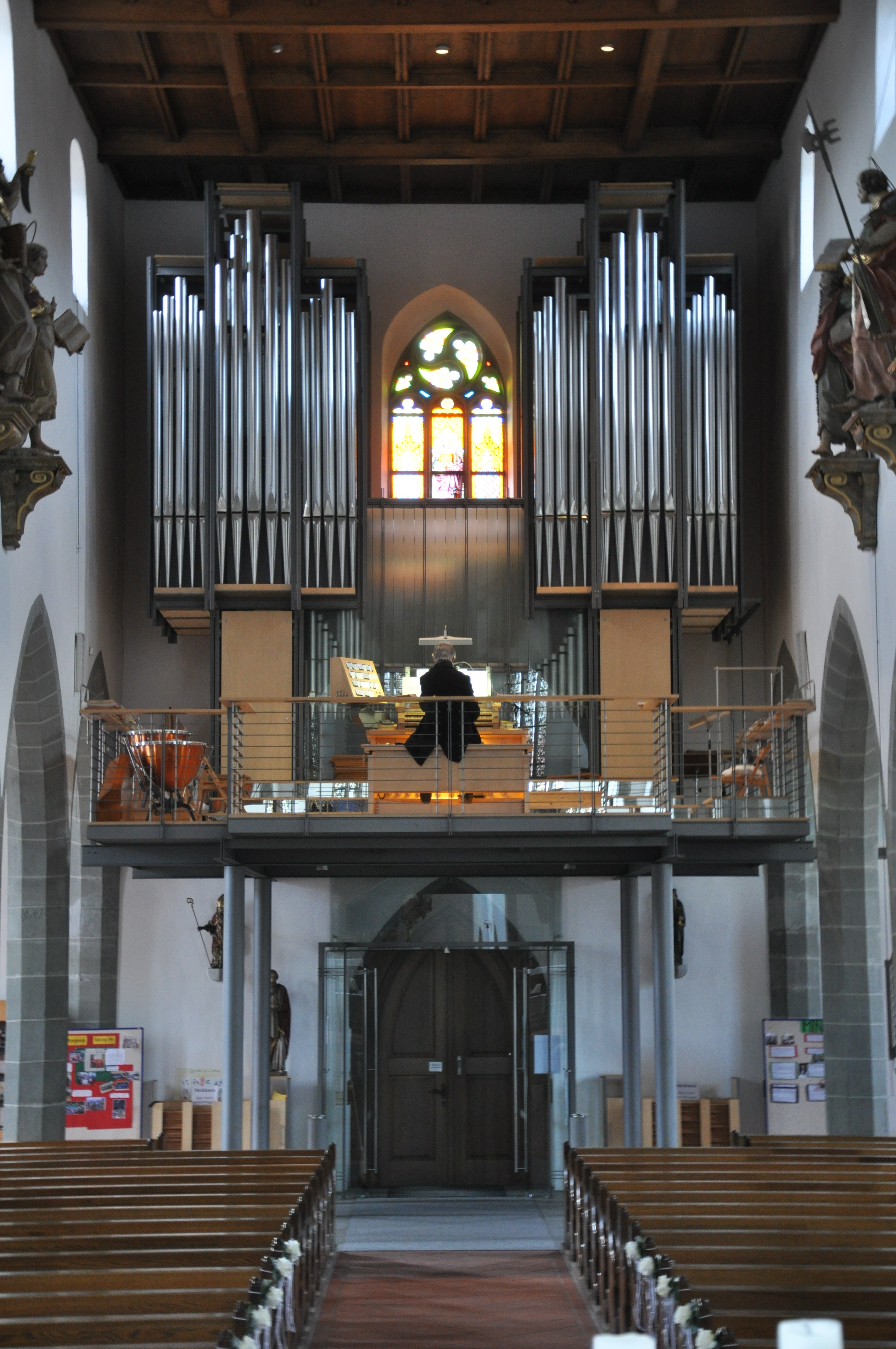 Kath. Pfarrkirche St. Nikolaus, Markdorf Orgel (Karl Göckel Orgelbau, 1998)